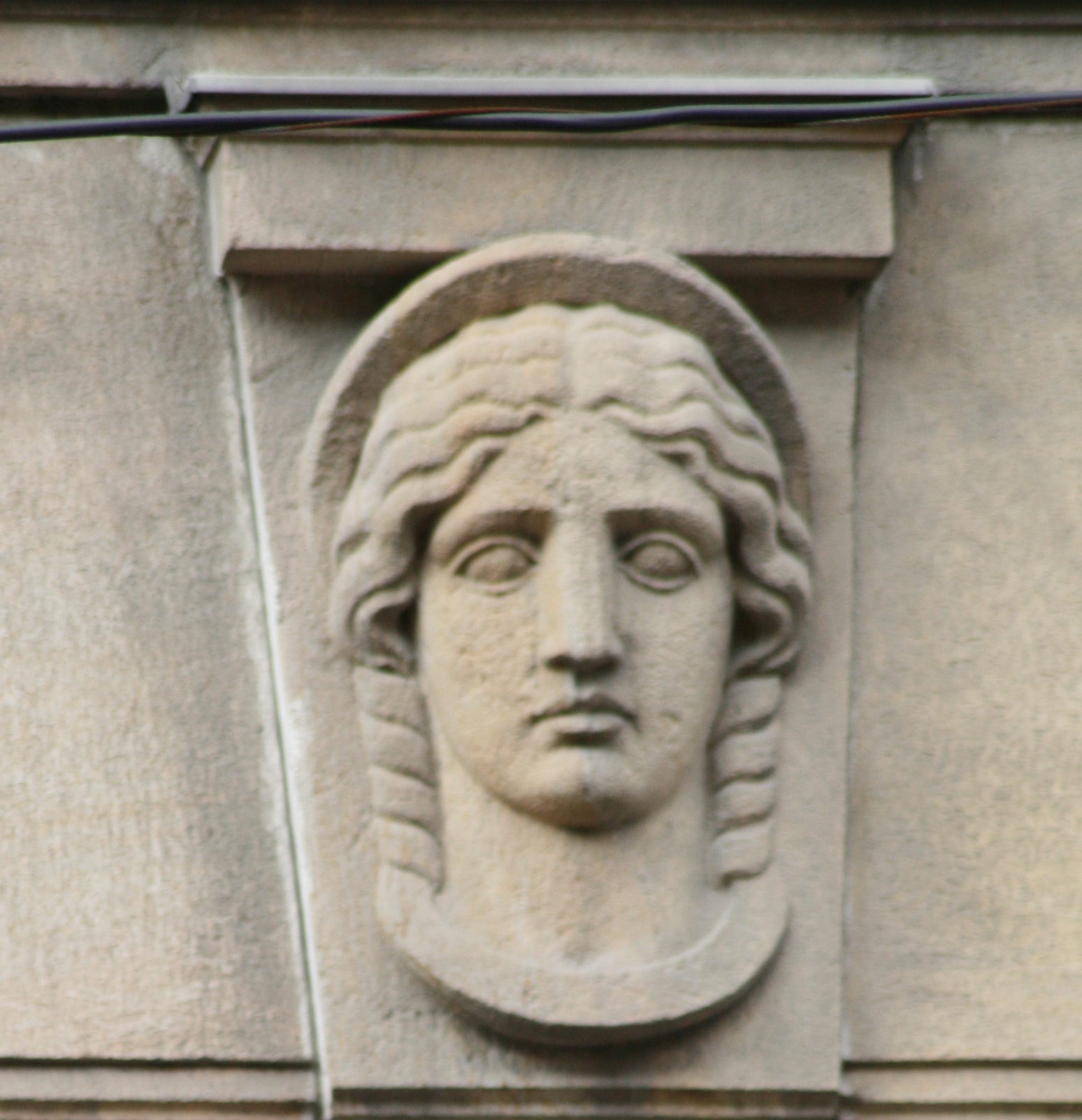 Reliéf na budove na Štúrovej ulici v Bratislave